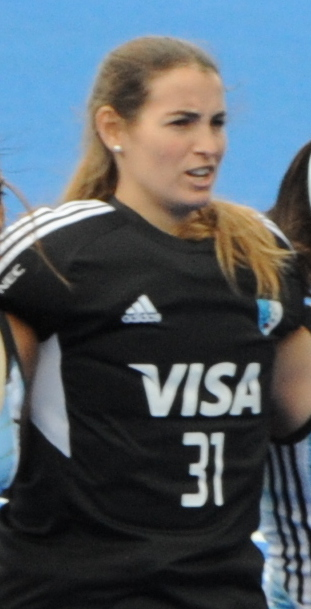 GB v Argentina 2016 CT